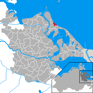 Trassenheide, Landkreis Ostvorpommern, Mecklenburg-Vorpommern